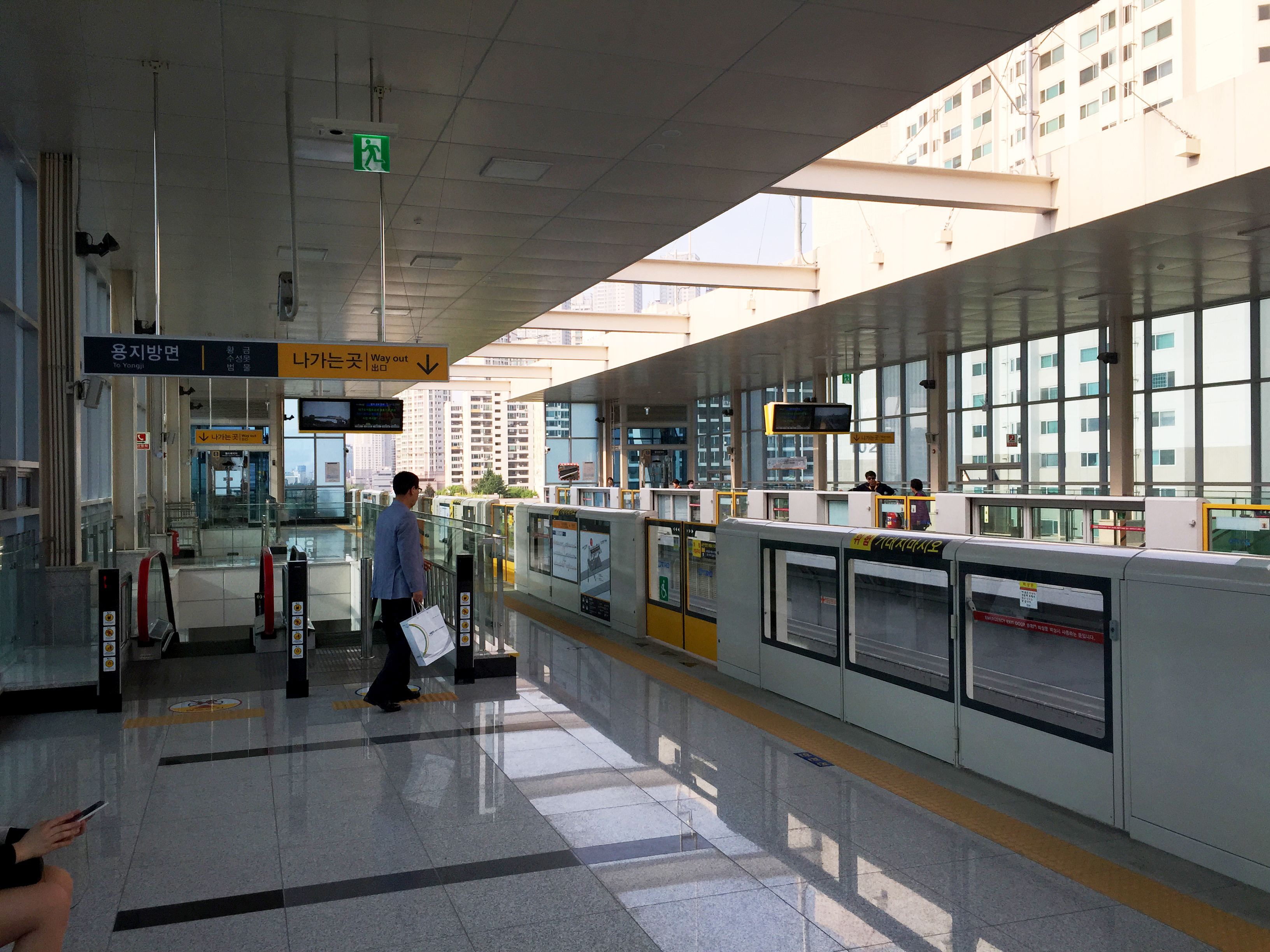 수성구민운동장역 승강장